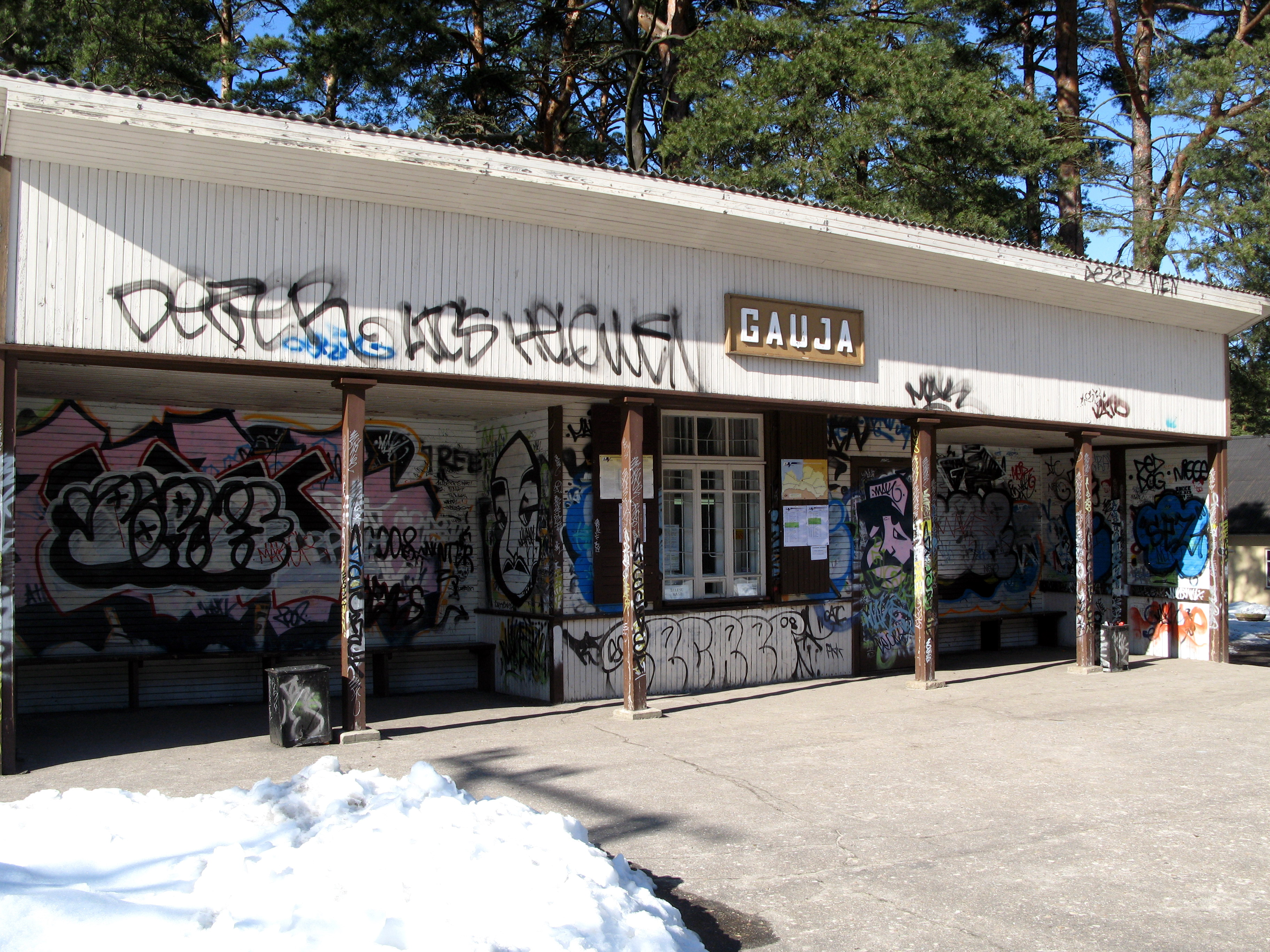 Gaujas stacija